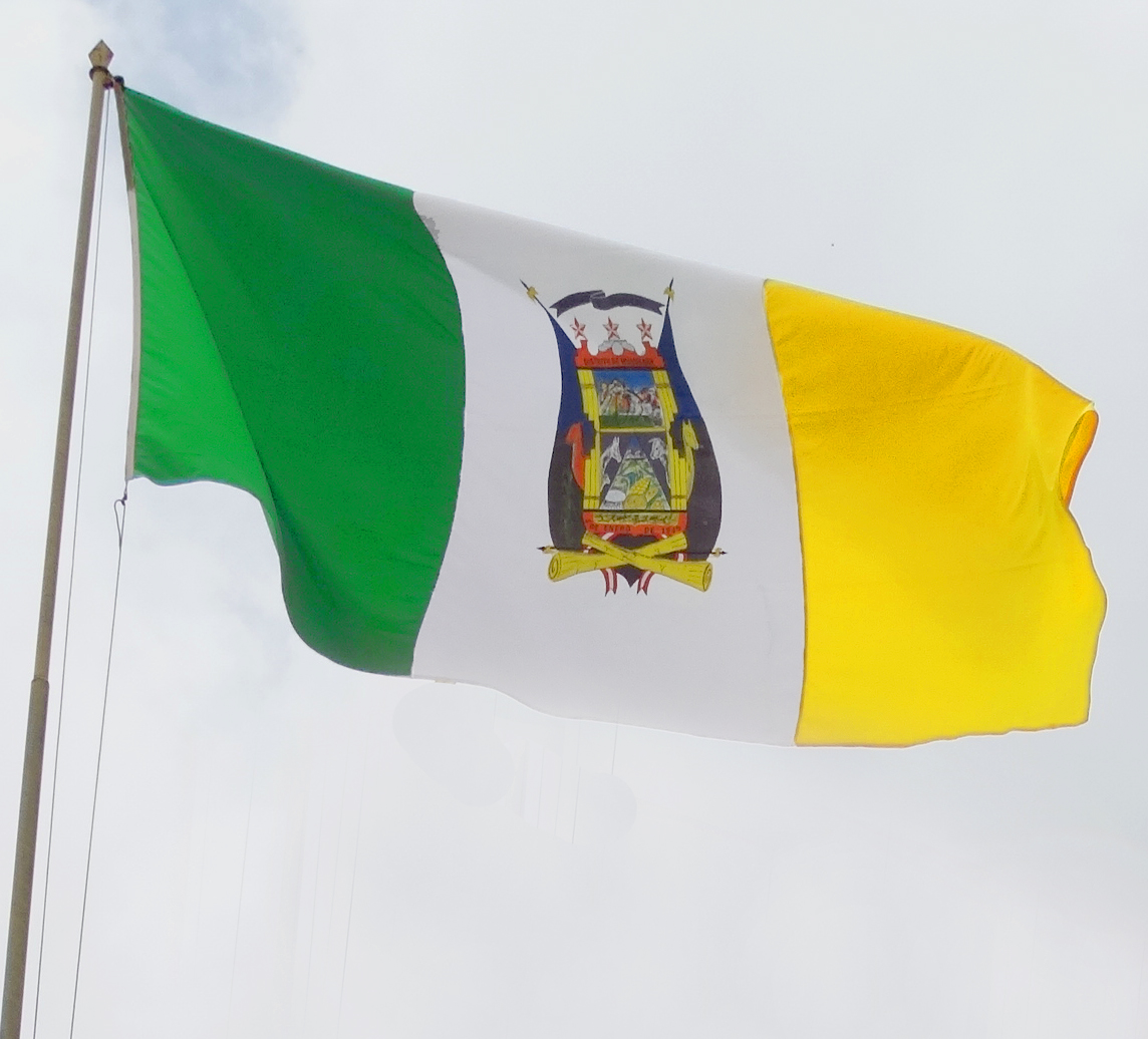 Bandera del Distrito de Huanuara